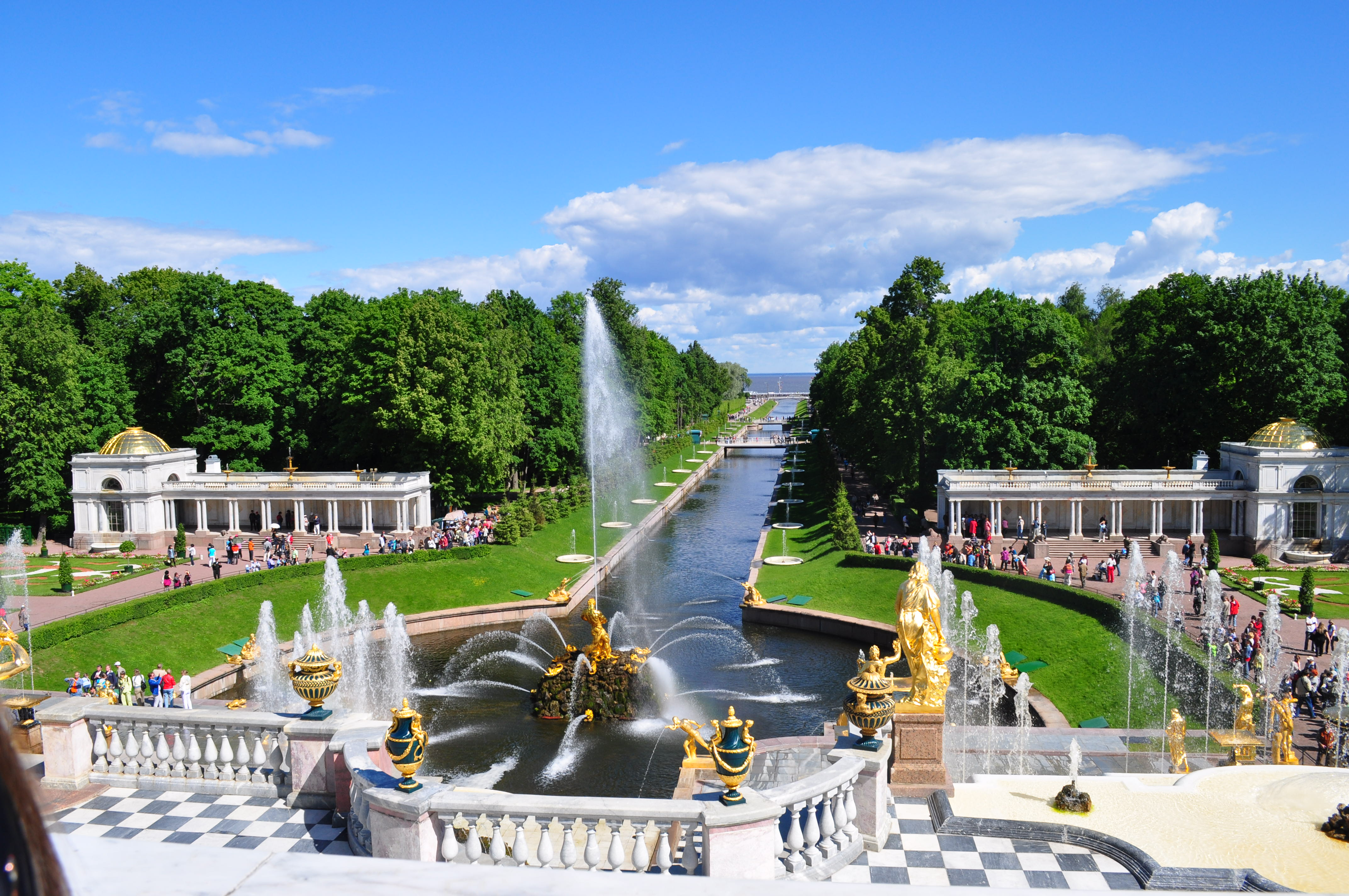 Петергоф в перспективе